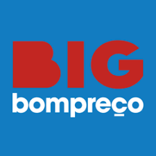 Logomarca do Big Bompreço